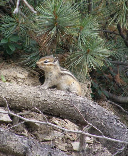 Chipmunk, Kolyma, Russia